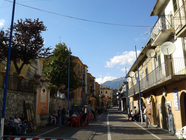 Scorcio fotografico di Roccavivi